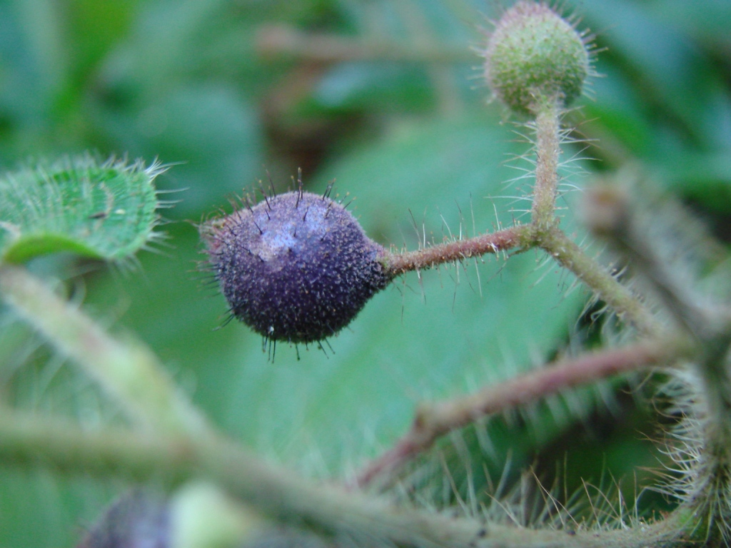 Clidemia octona - MELASTOMATACEAE Parque Nacional da Chapada dos Veadeiros - Alto Paraíso de Goiás - Goiás - Brasil.